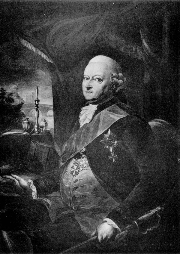 Karl Wilhelm Finck von Finckenstein 1714-1800 prussian statesman.